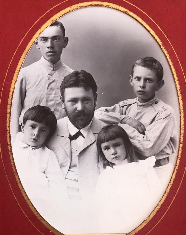 Петр Епифанович Митник во Владикавказе